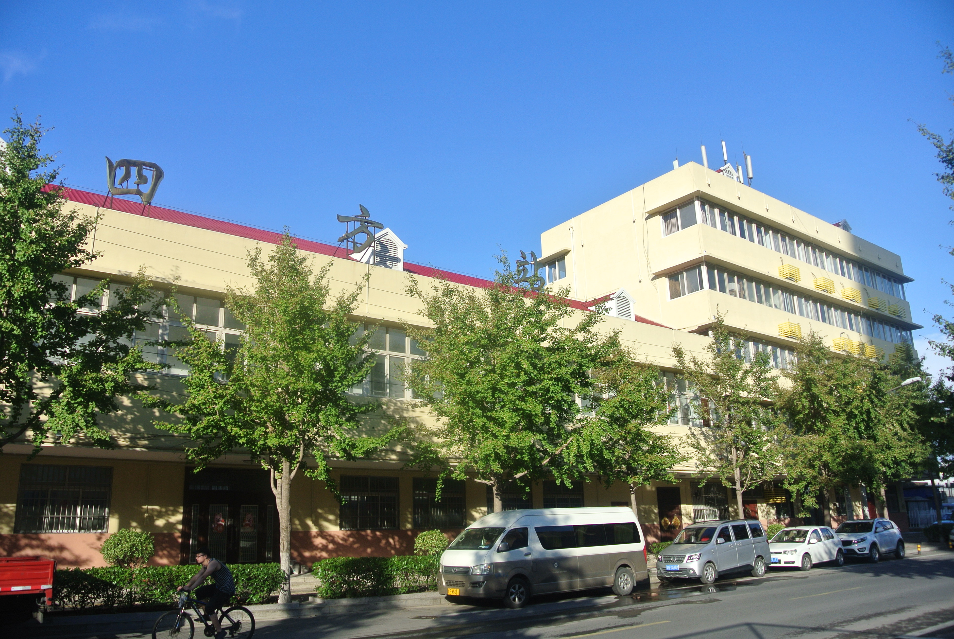 青岛四方火车站站房